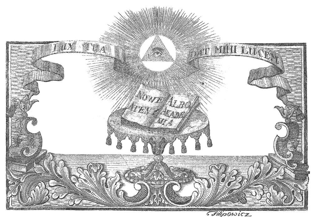 Nowe Ateny, ilustracja znajdująca się na jednej z pierwszych stron encyklopedii